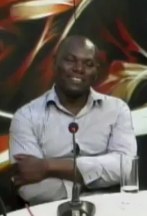 Ronny Asabina